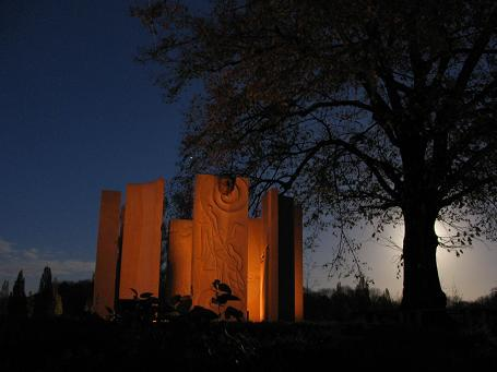 Steindenkmal Cappenberg